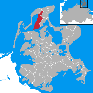 Wiek, Landkreis Rügen, Mecklenburg-Vorpommern